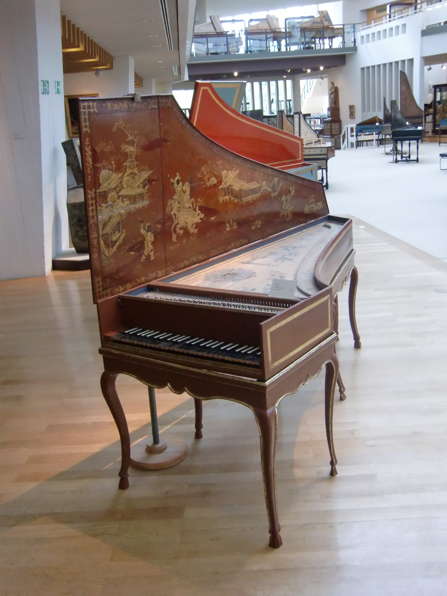 Clavecin français anonyme - vers 1720 - Chinoiserie sur l'intérieur du couvercle - Berlin, Musikinstrumentenmuseum